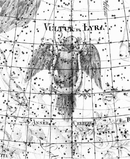 Lyra